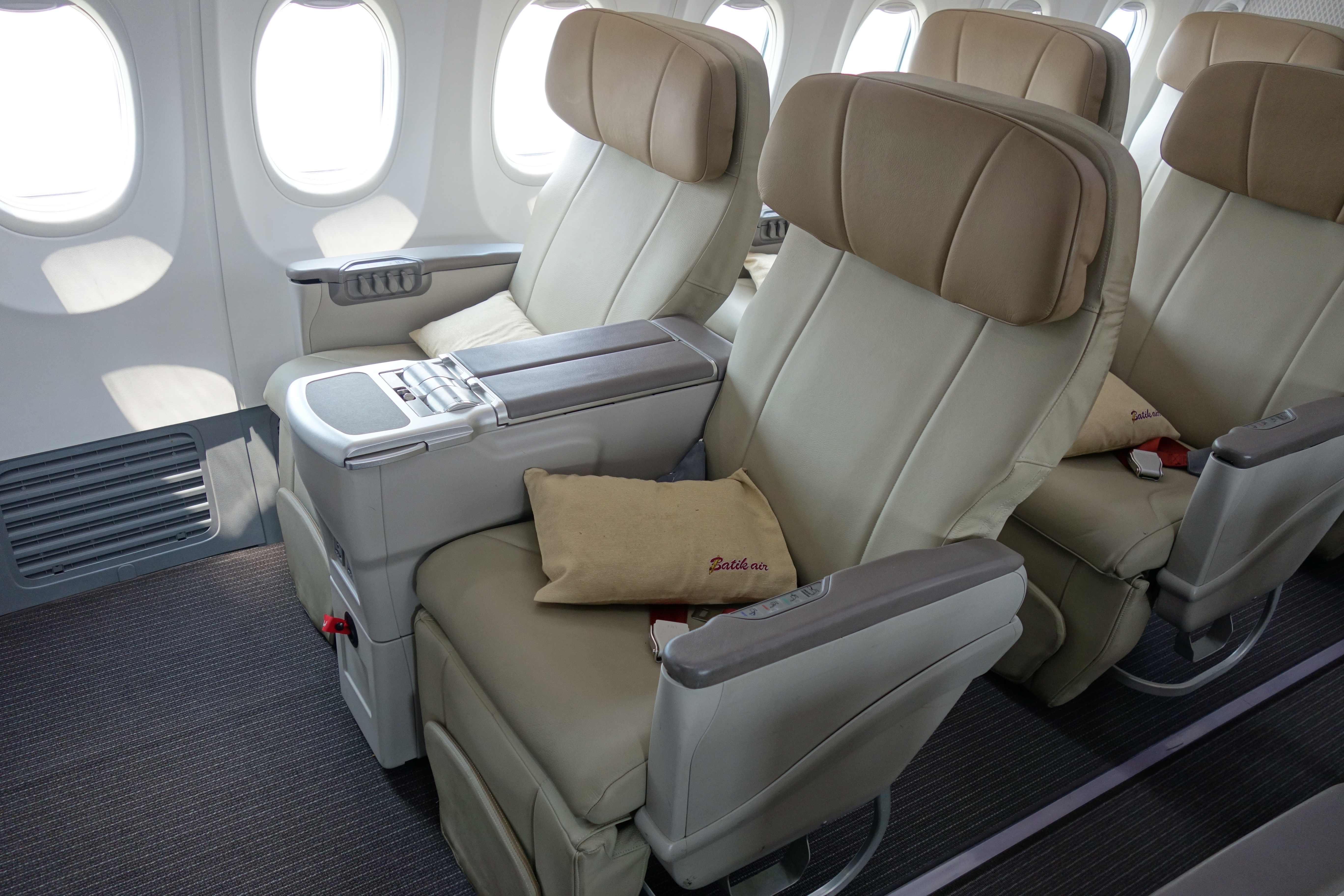 バティック・エア ビジネスクラス